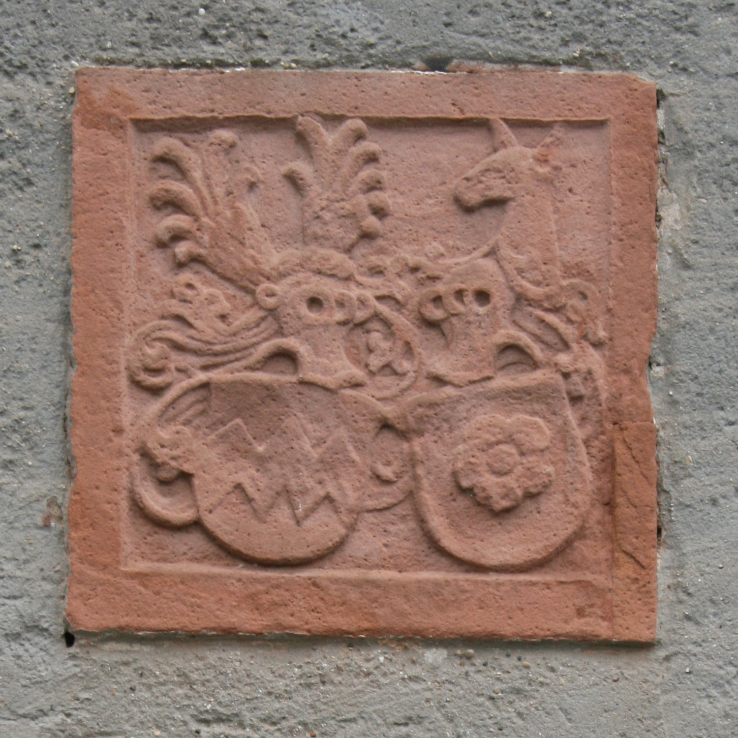 Wappen des Friedberger Burggrafen Johann Brendel von Homburg am Burgmannenhaus der Familie in der Burg Friedberg, Ehewappen mit Appolonia vom Stein.